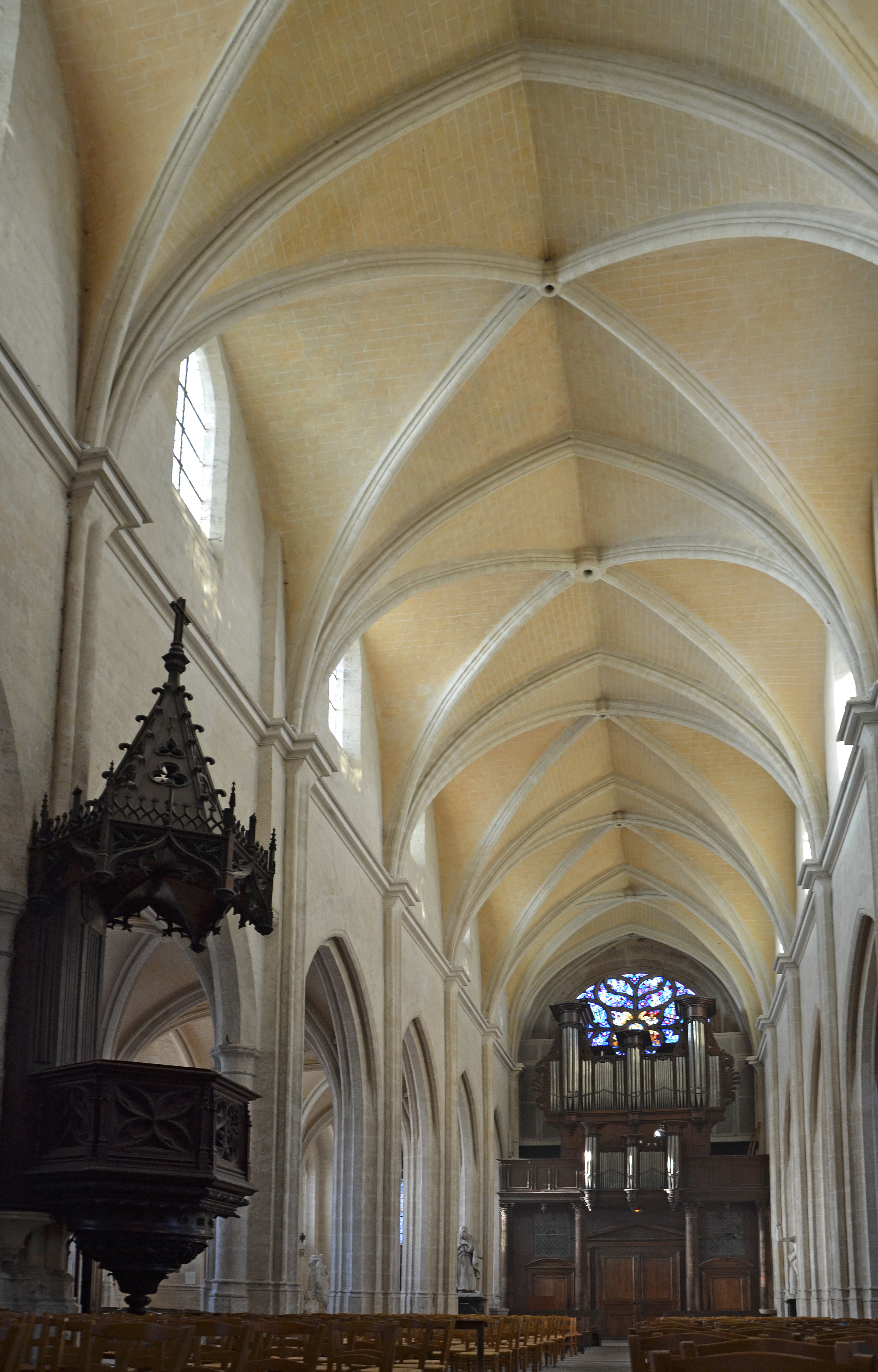 Église Saint-Antoine à Compiègne, Oise, Picardie, France